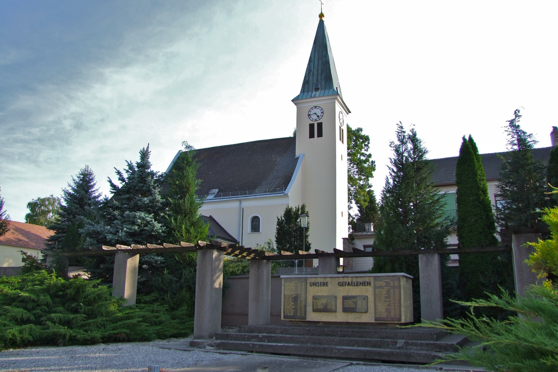 Kath. Filialkirche hl. Leonhard, Reyersdorf